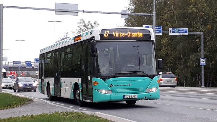 47 bussiliin sõitmas mööda Ehitajate teed